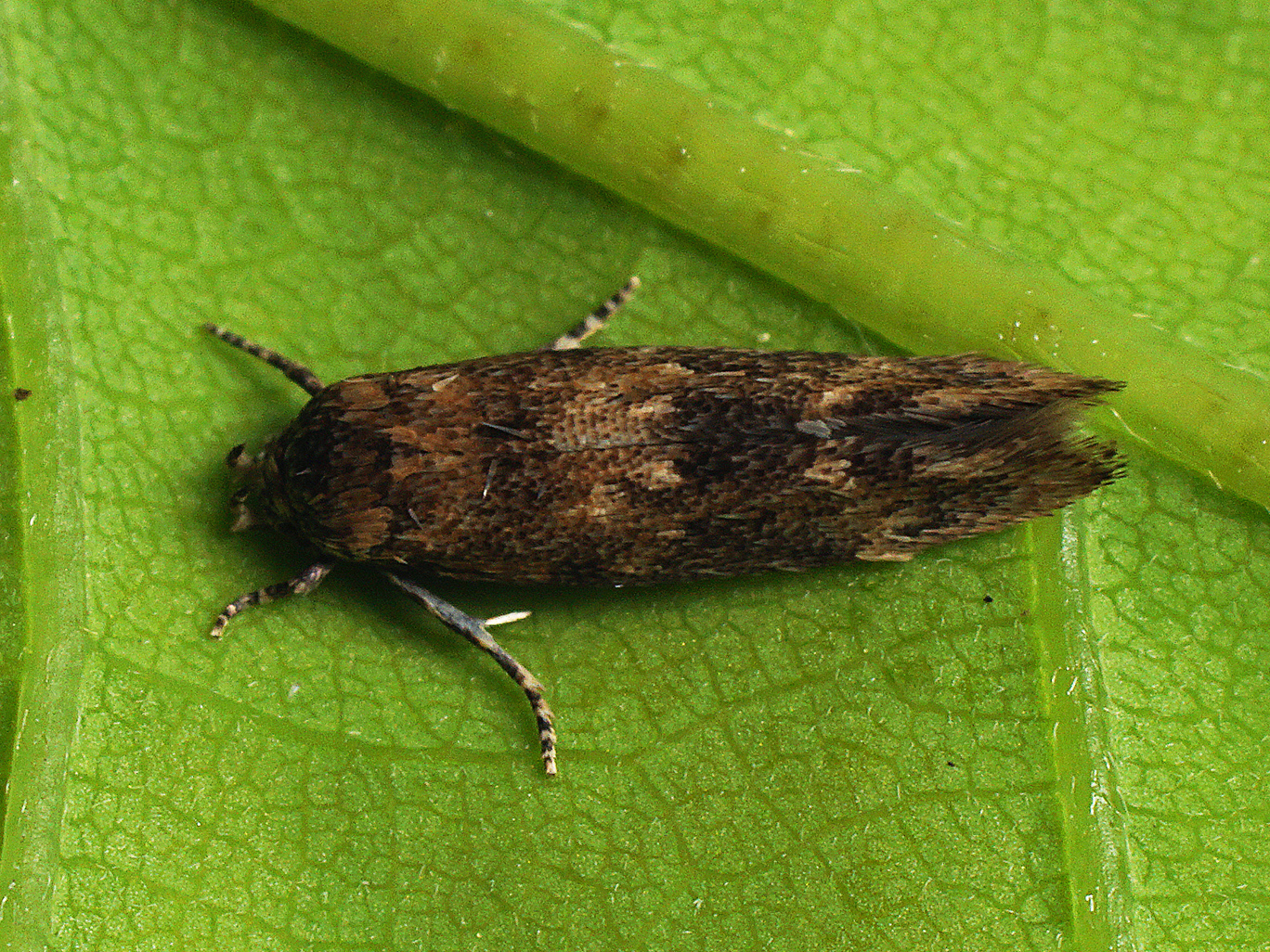 Exemplar found: Russia, Moscow Oblast, Odintsovsky District, near village Pestovo, 13.05.2018, by light МО, Одинцовский р-н, окрестности деревни Пестово, 13.05.2018, на свет